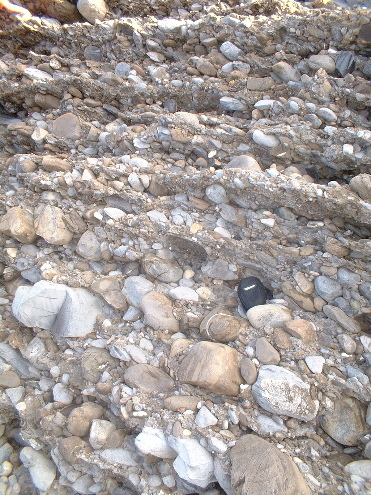 Conglomerato